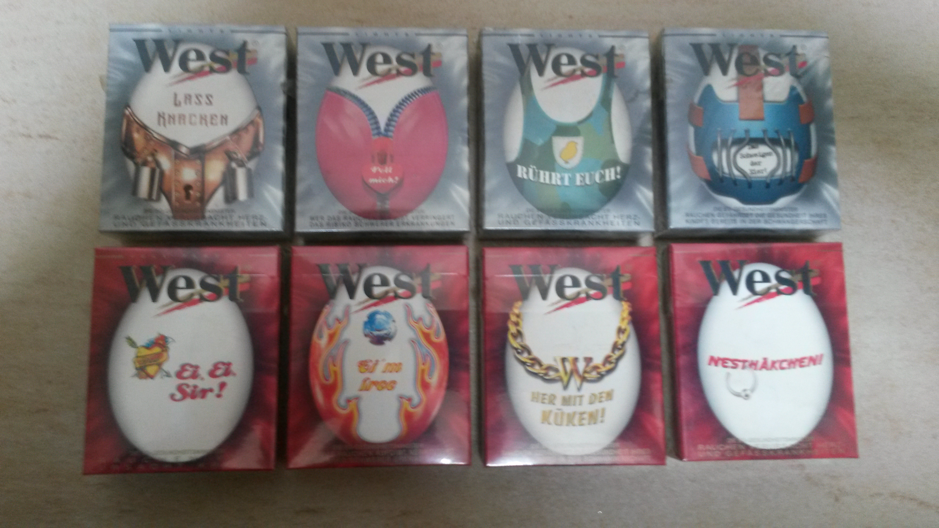 West Sonder Edition Ostern, einseitig mit "coolen Sprüchen"